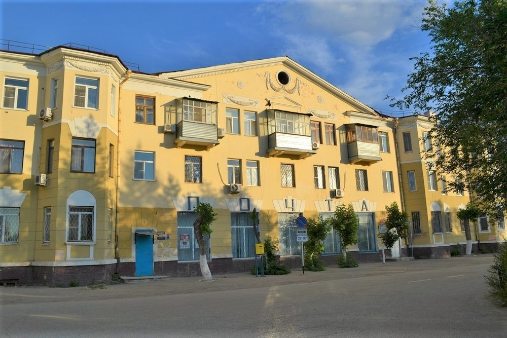 Здание на ул. Махамбетова (Актобе).